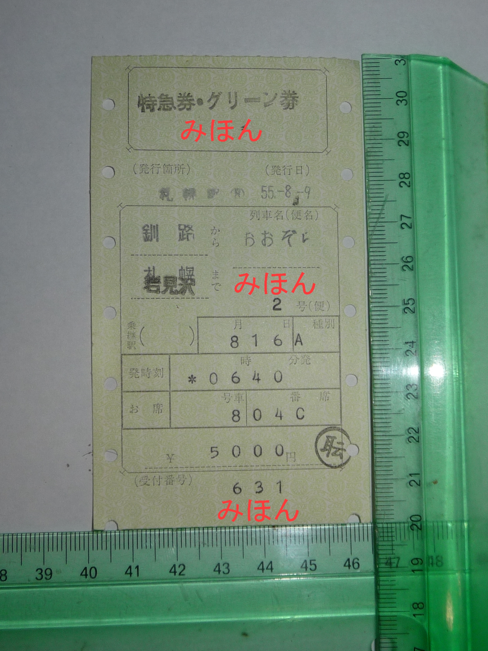 特急おおぞら2号の特急券、グリーン券